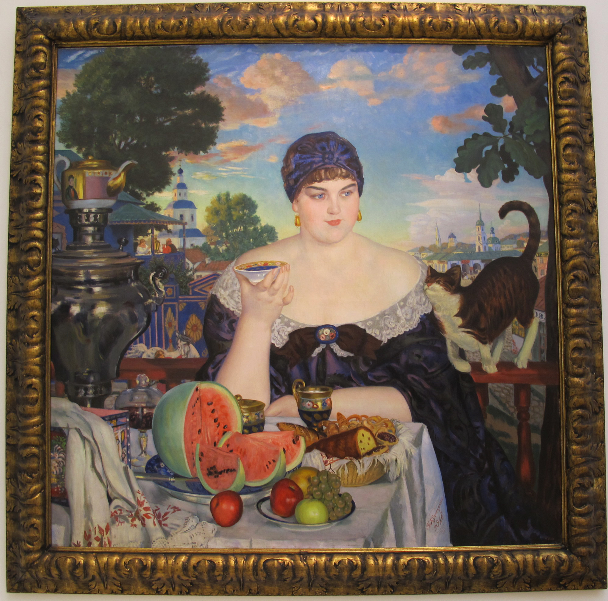 Boris kustodiev, la moglie del mercante al te, 1918